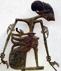 Damarwulan, Wayang Klitik aus Ostjava, ca. 1900. Damarwulan ist der Hauptheld der Darmawulan-Erzählungen.